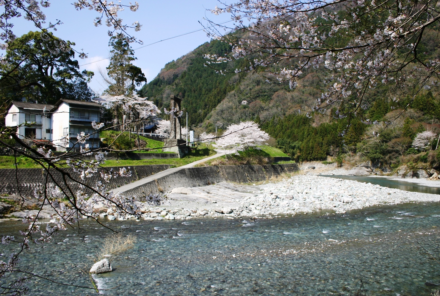 Cherryblossom at Anabuki River, Mima-shi, Tokushima-ken, Japan